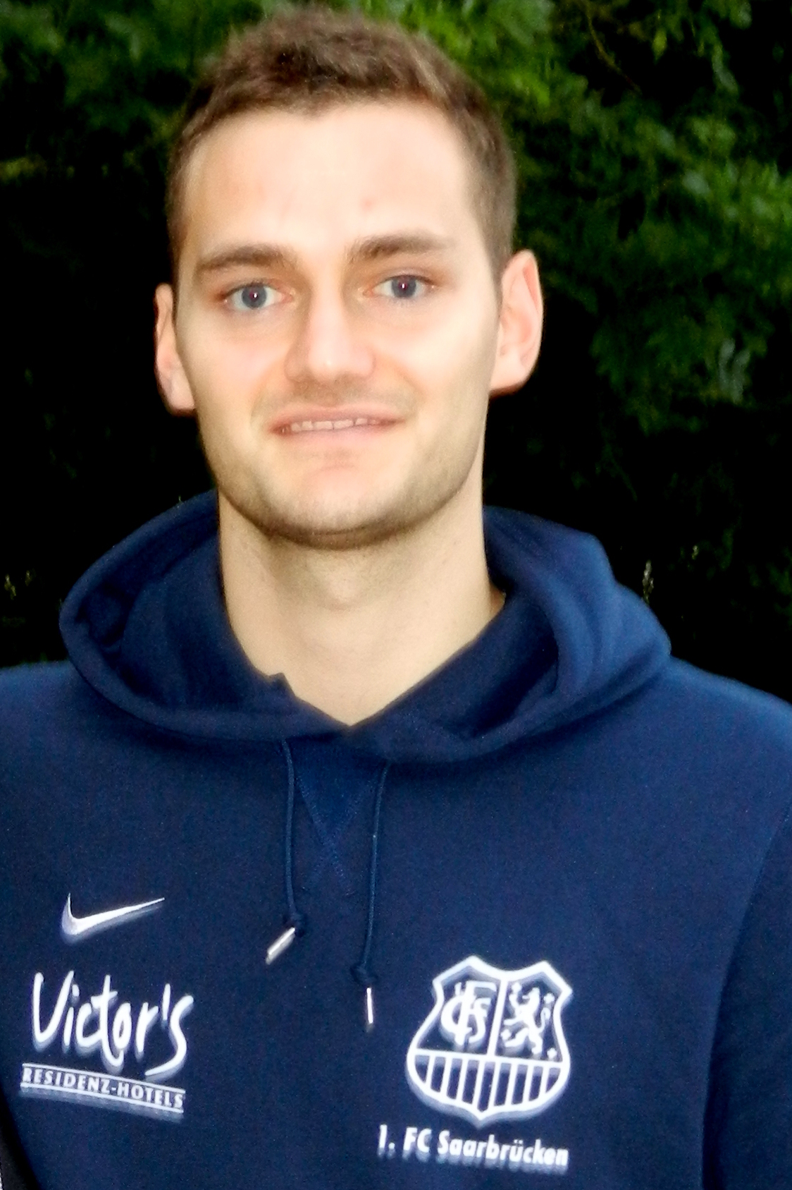 Michael Müller nach dem Testspiel gegen F 91 Dudelange